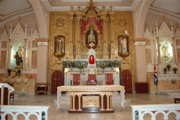 Se puede observar las imágenes de Cristo Resucitado y de San José en el retablo principal y en las naves del costado al Sagrado Corazón de Jesús (izquierda) y el altar de la Virgen de la Caridad del Cobre (derecha) la patrona de Cuba